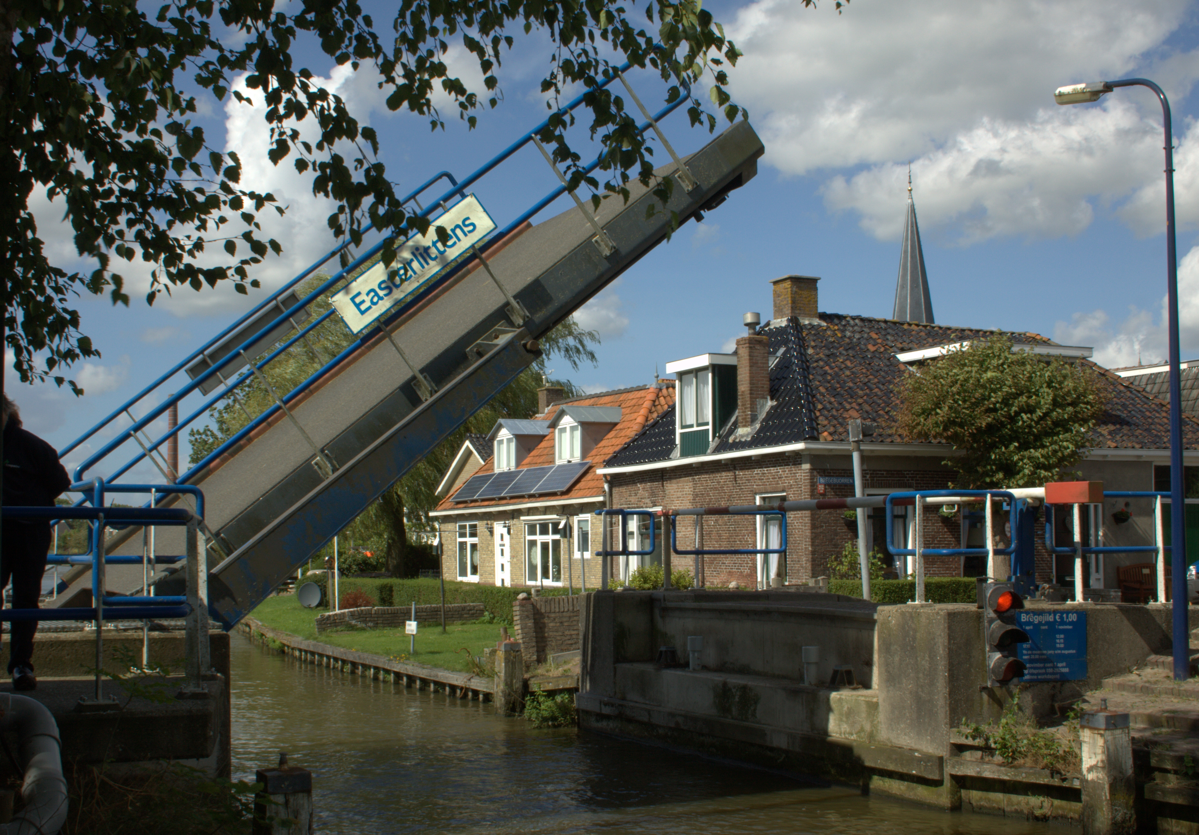 De Brug inde Franekervaart gaat open voor de inde zomer drukke pleziervaart.